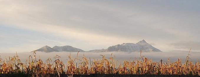 Fotografía del Nevado de Toluca tomada desde un maizal